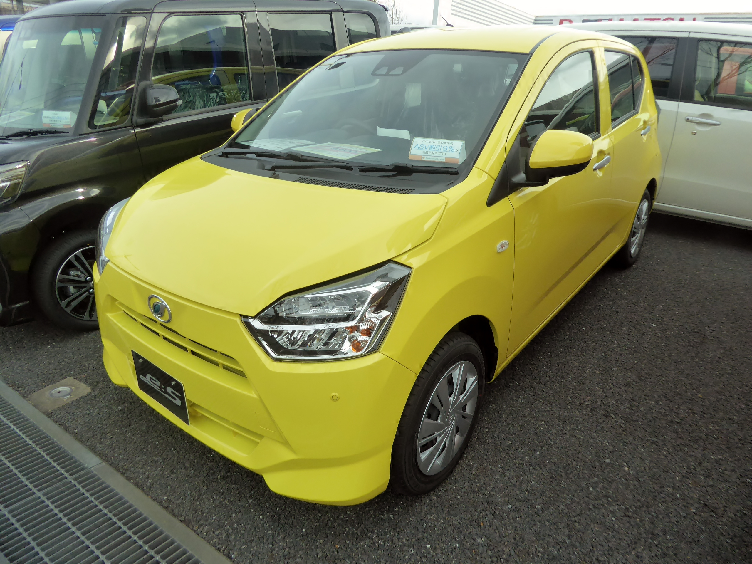 5BA-LA350S-GBGF型ダイハツ・ミライースX"SA III"を撮影。